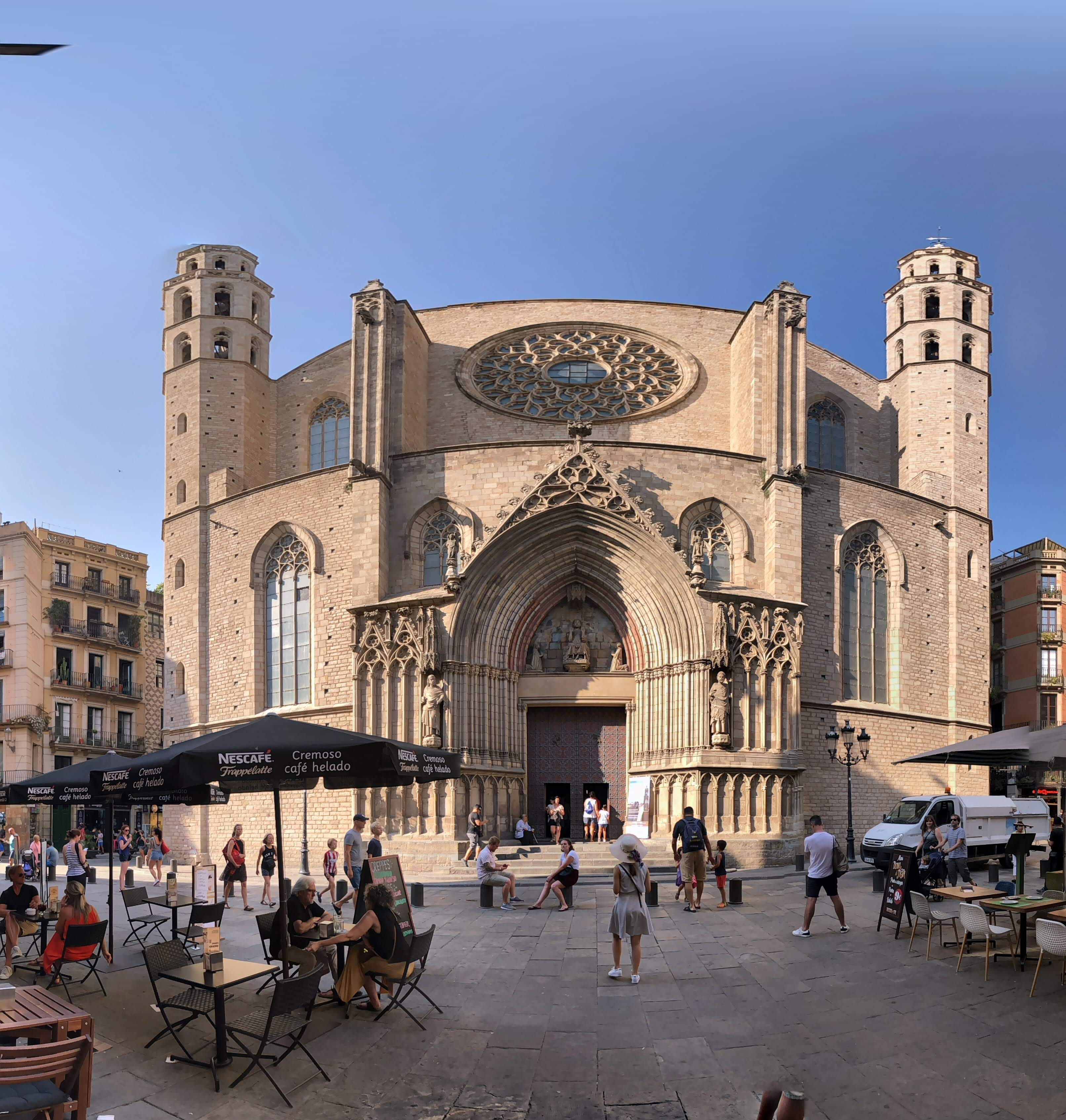 海上聖母瑪利亞教堂